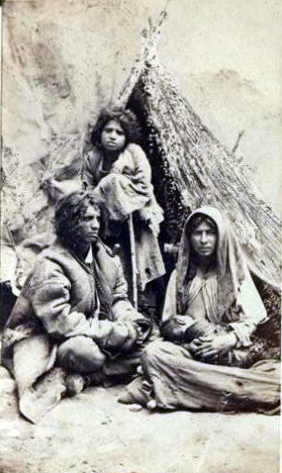 Familie de ţigani cu doi copii, Fotografie realizată pe hârtie subţire lipită pe carton, Detinator: Complexul Naţional Muzeal "ASTRA" - SIBIU